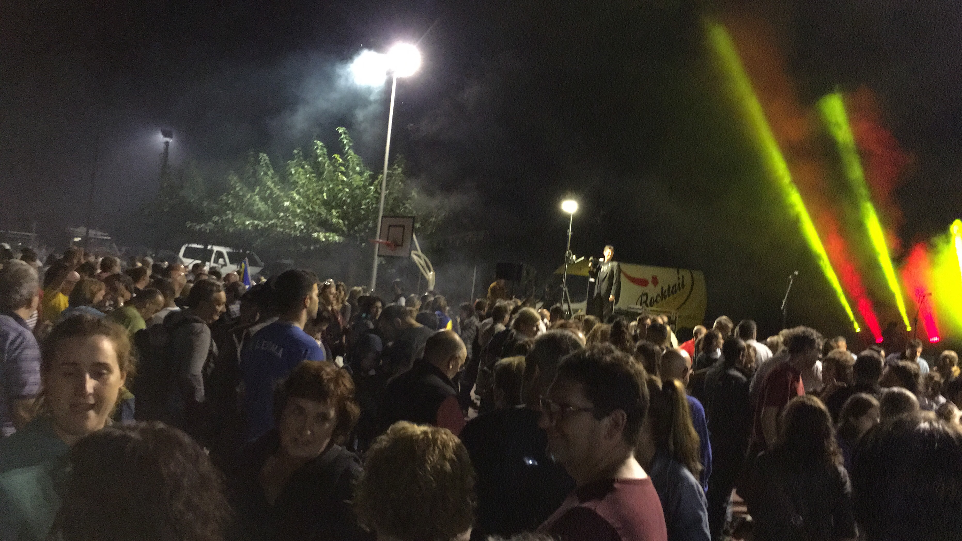 lectura del manifest condemnant la violència exercida pels cosos de l'estat